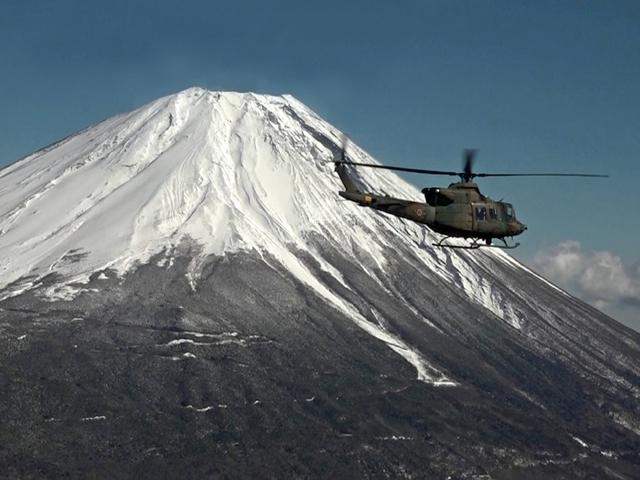 ３月８日、栃木県宇都宮市から航空学校本校のある明野駐屯地へ向かう途中のワンショット。